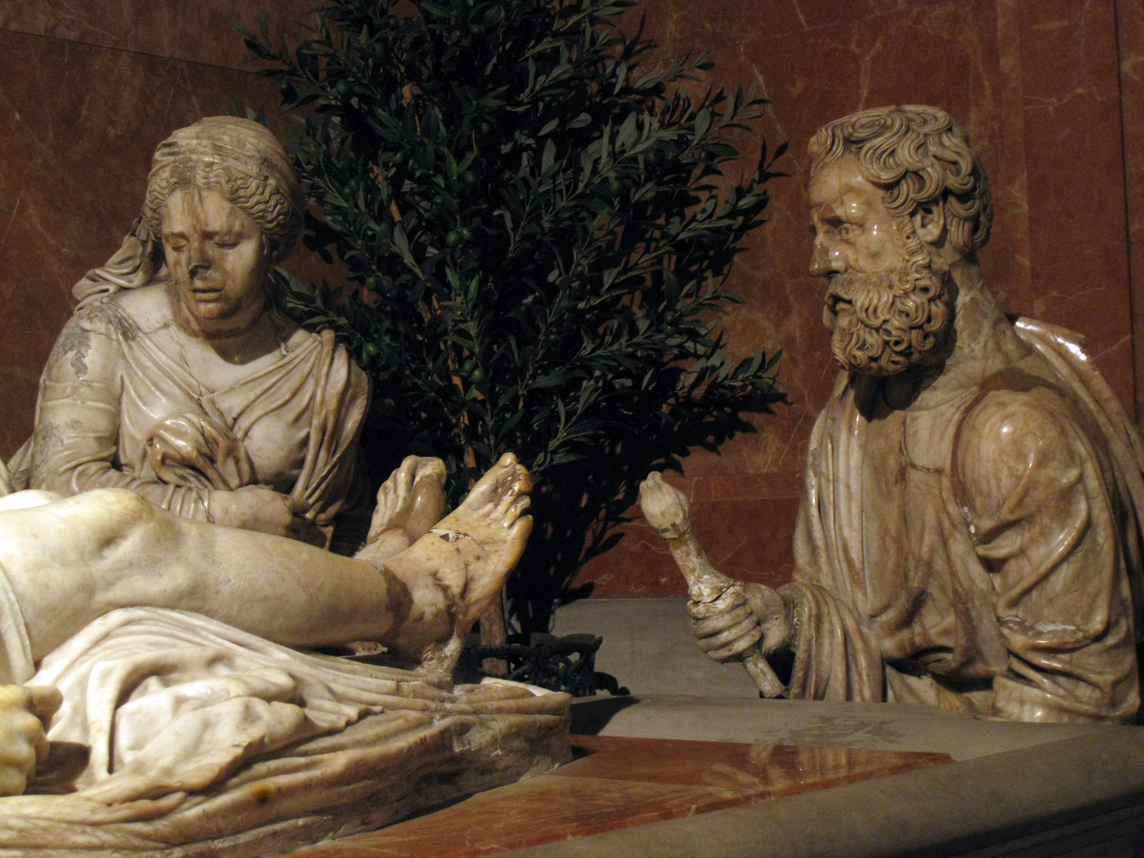 Catedral del Sant Esperit (Terrassa), el_Sant_Enterrament_de_Martín_Díez de Liatzasolo (1544)